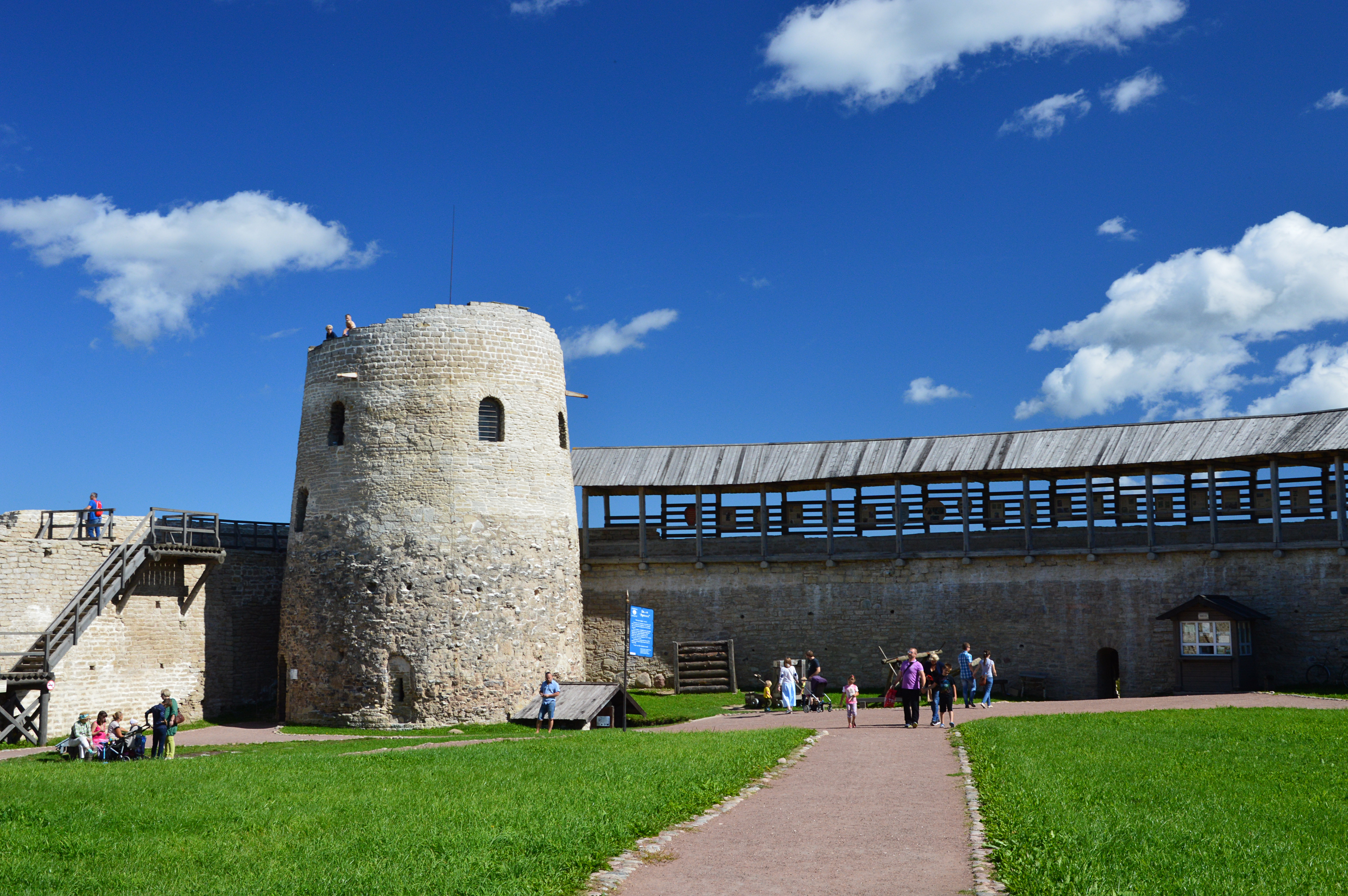 Изборская крепость, башня Луковка.